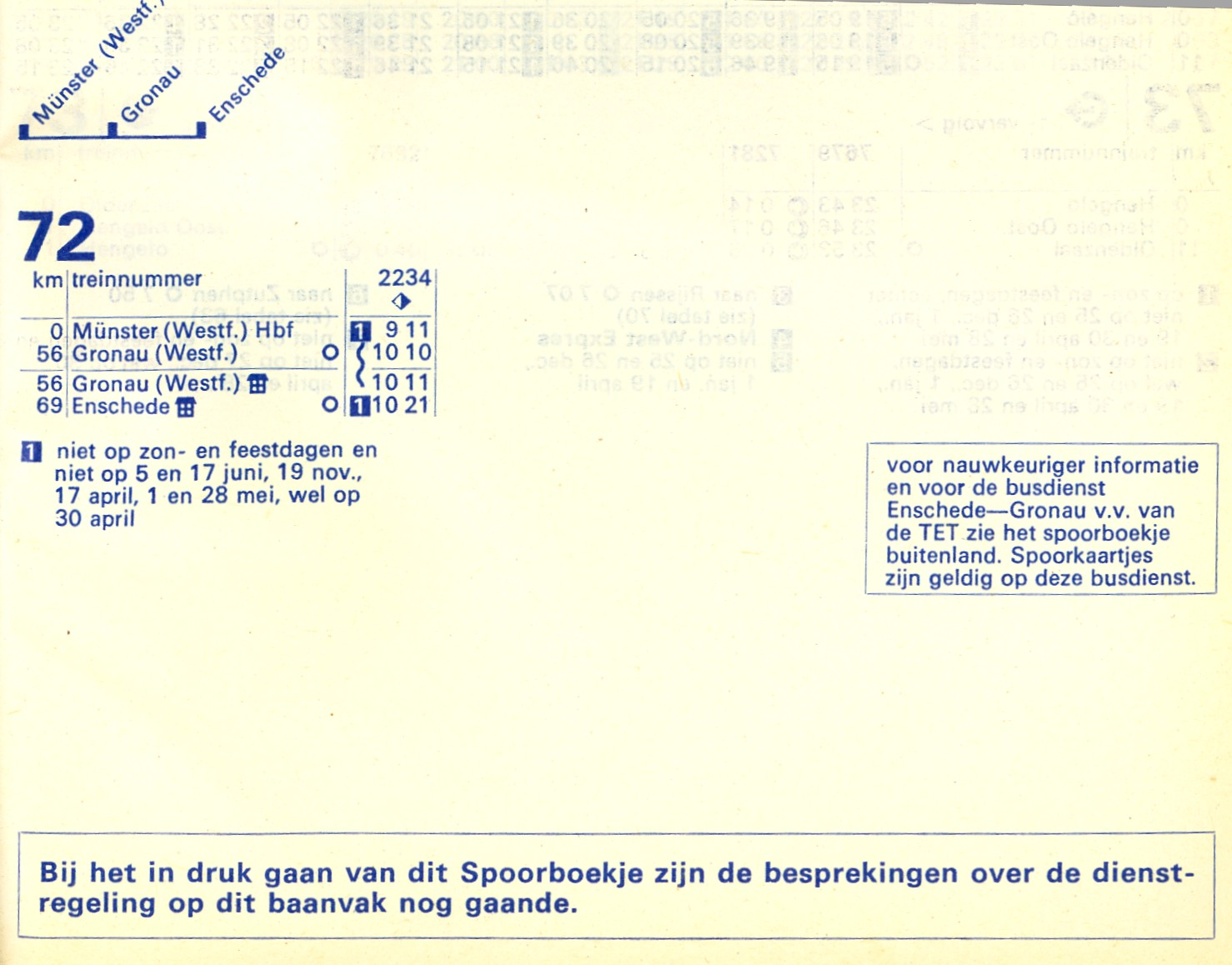 Fragment van tabel 72 uit het spoorboekje '80/'81 Spoorlijn Zutphen - Glanerbeek (Staatslijn D)